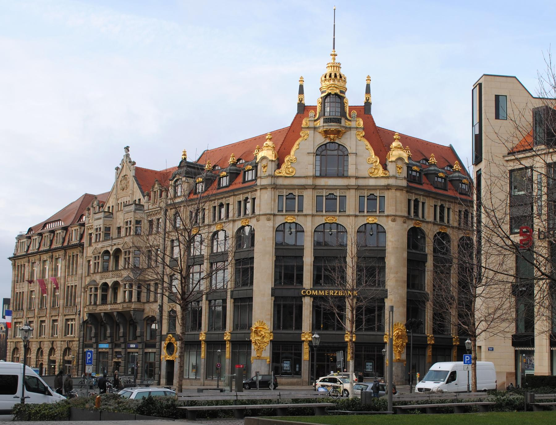 Commerzbank in Leipzig